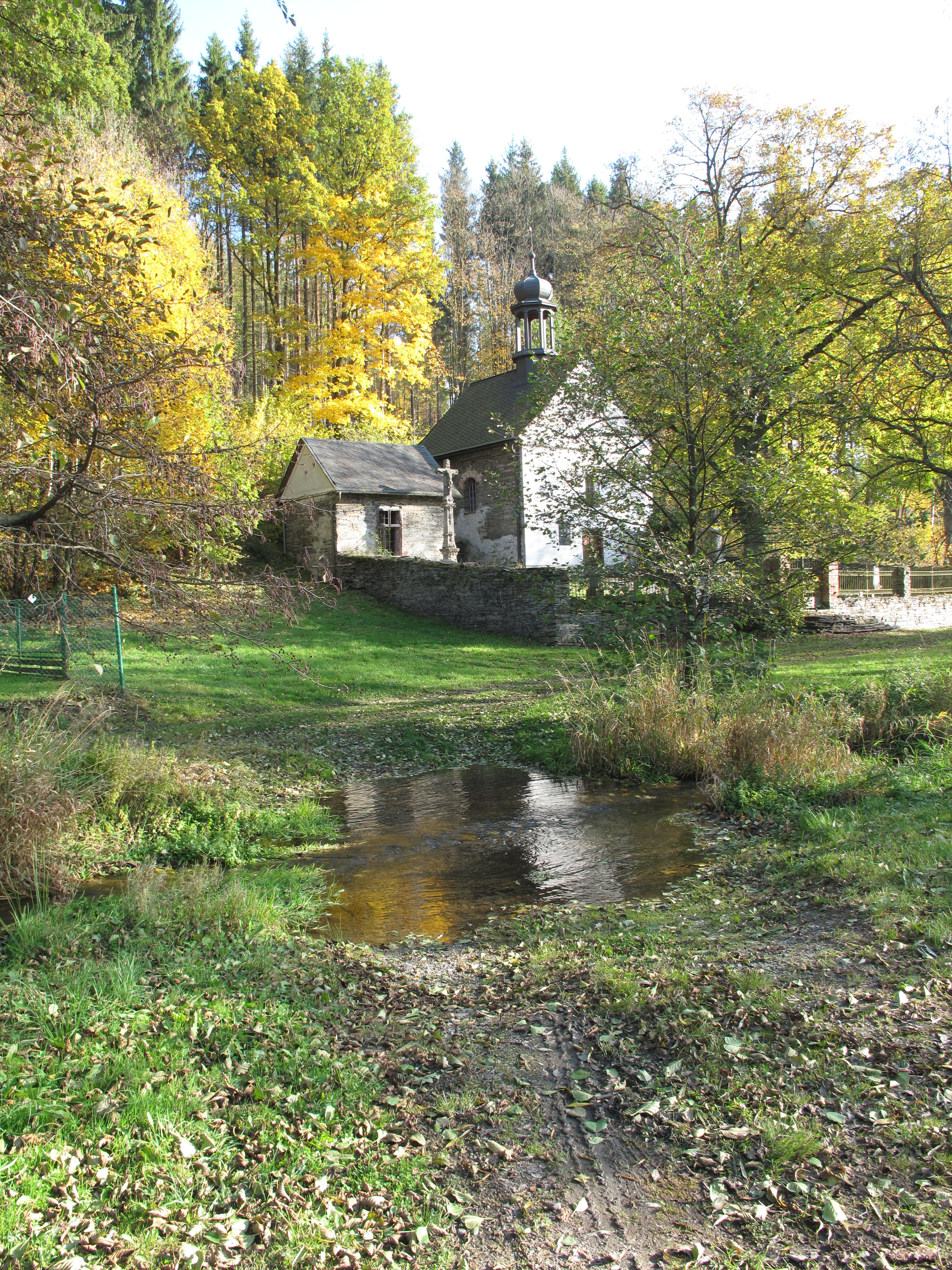 Trhavice. Okres Olomouc, Česká republika.